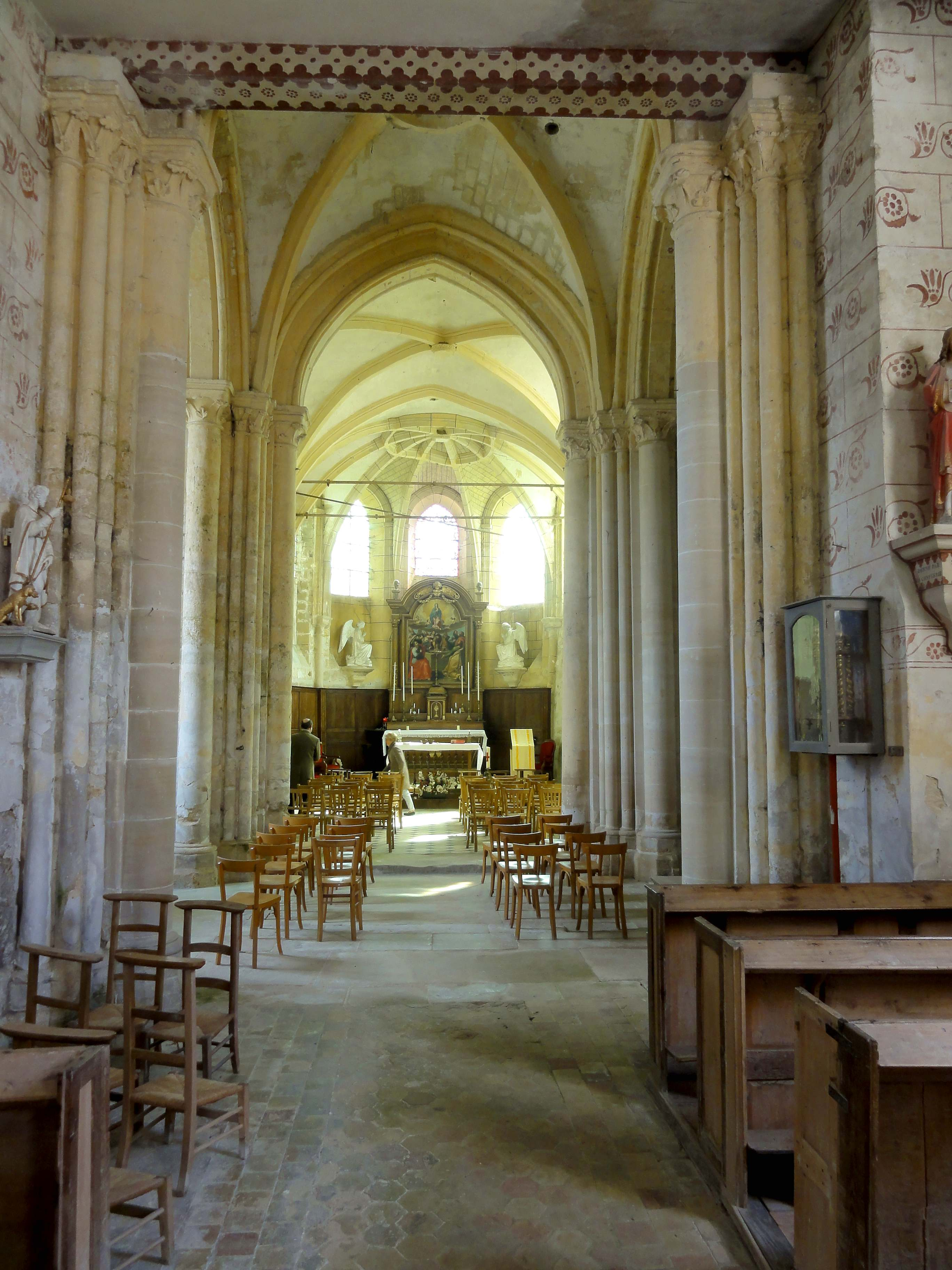 Intérieur de l'église - voir titre.